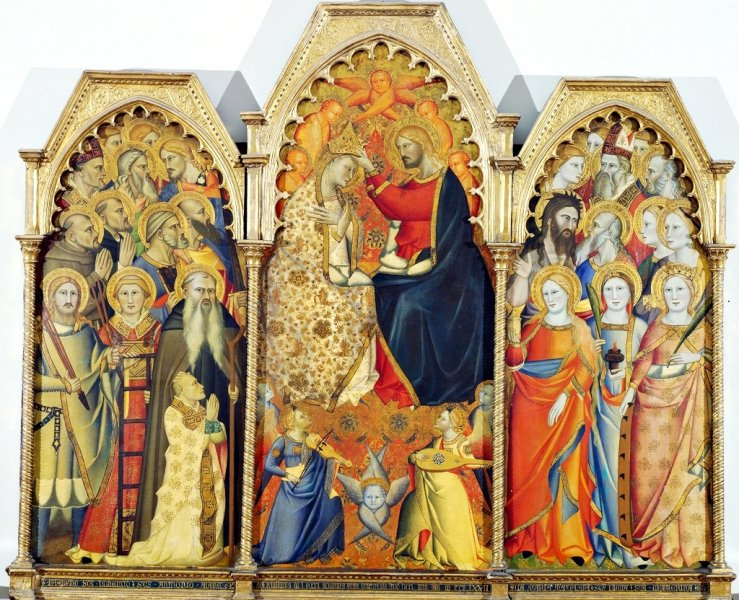 Giovanni del Biondo - Trittico 170 x 220 cm - tempera ed oro su tavola Fondazione Magnani Rocca, Mamiano di Traversetolo